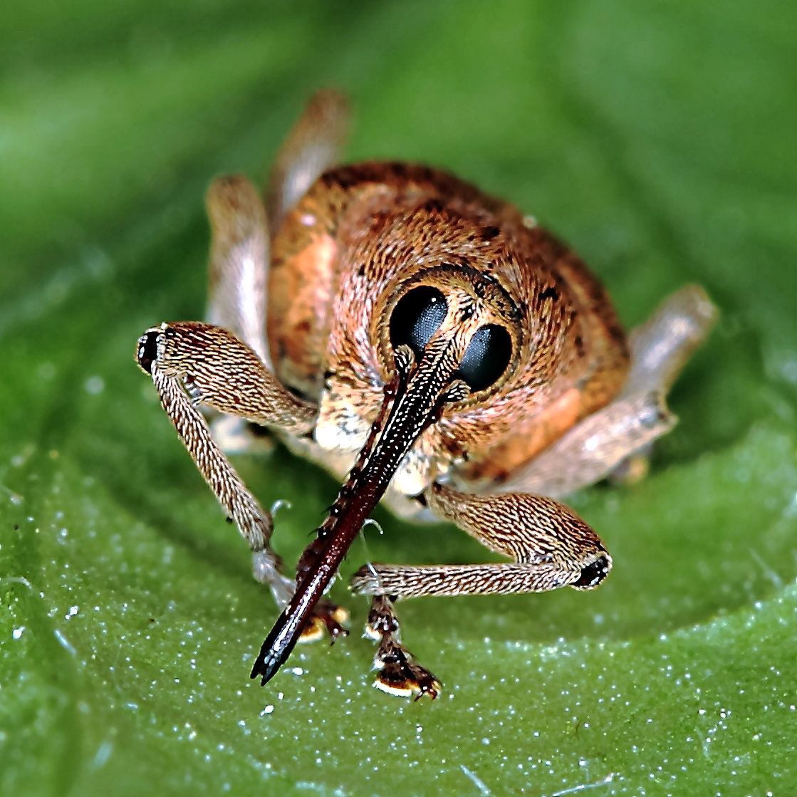 Haselnussbohrer